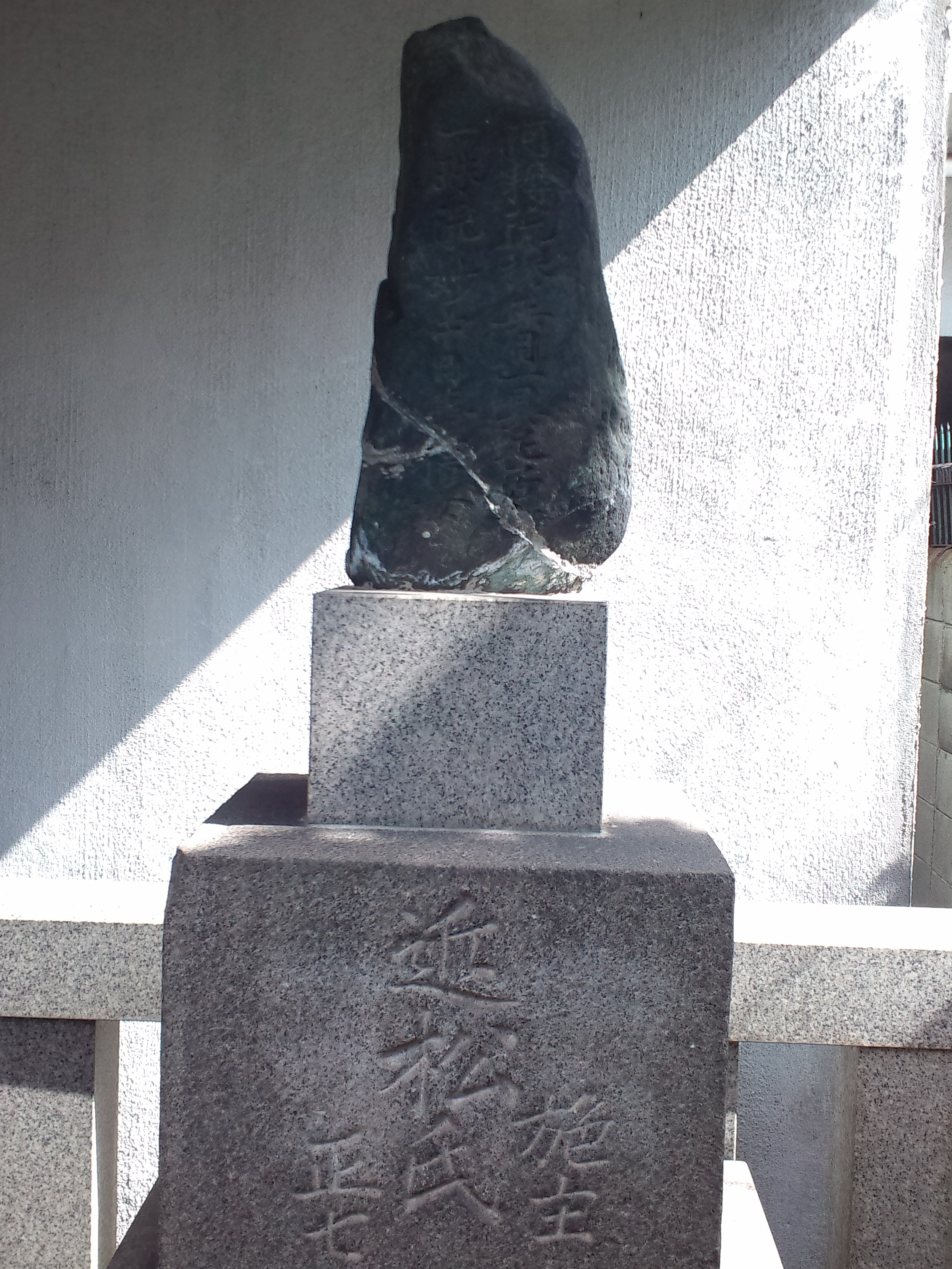 近松門左衛門の墓（大阪市中央区）